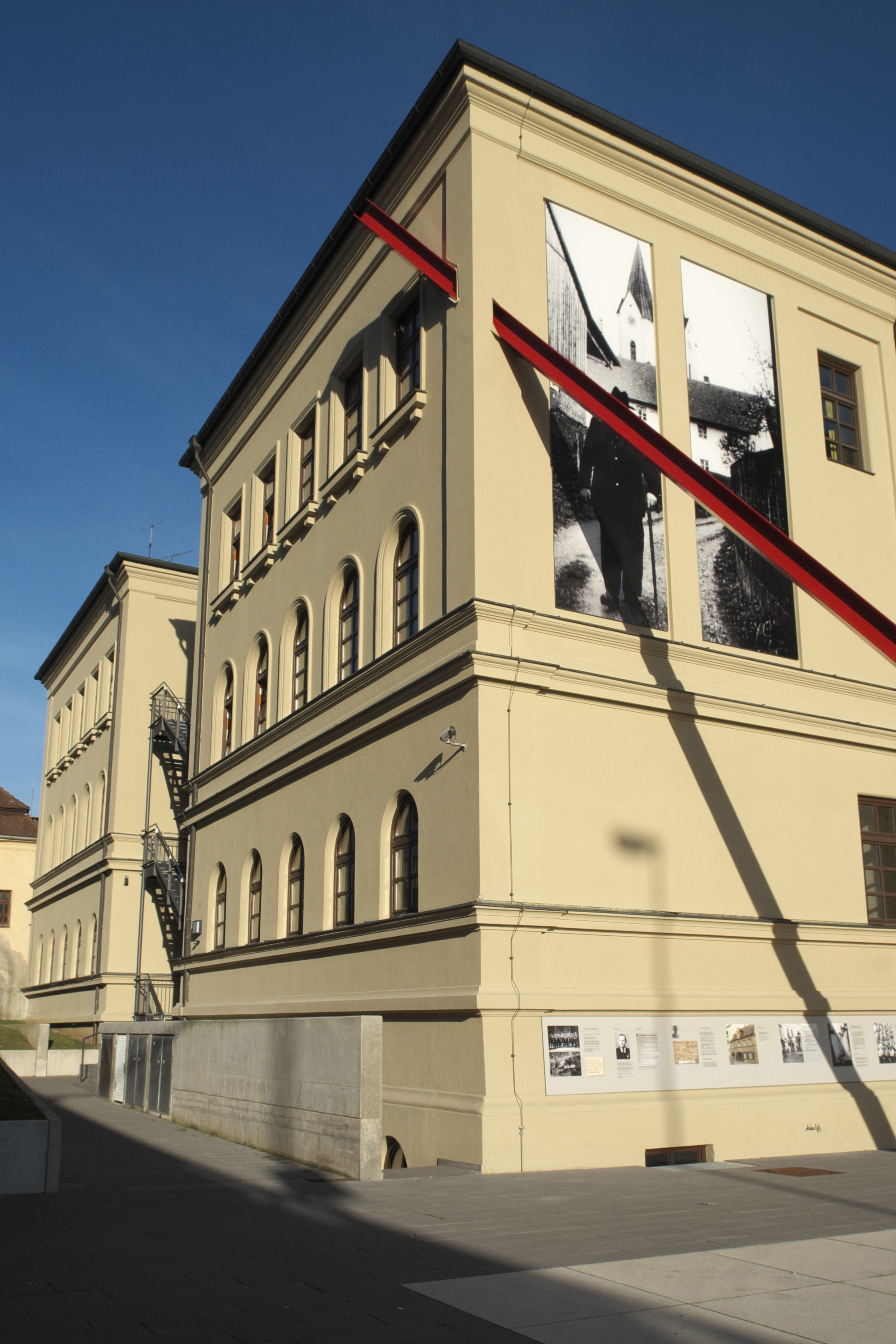 Ehemalige Mädchenschule in Pfaffenhofen an der Ilm (Bayern/Deutschland)